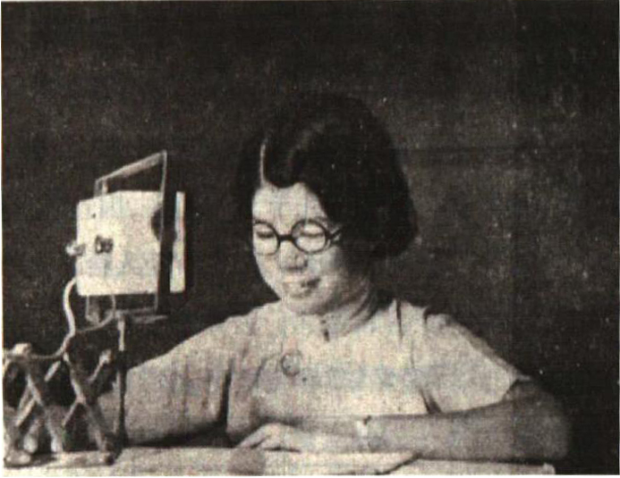 “南京之莺”刘俊英在播音